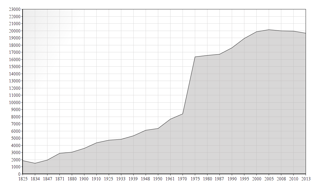 Dieses Bild zeigt die Bevölkerungsstatistik von Oberkirch (Baden)